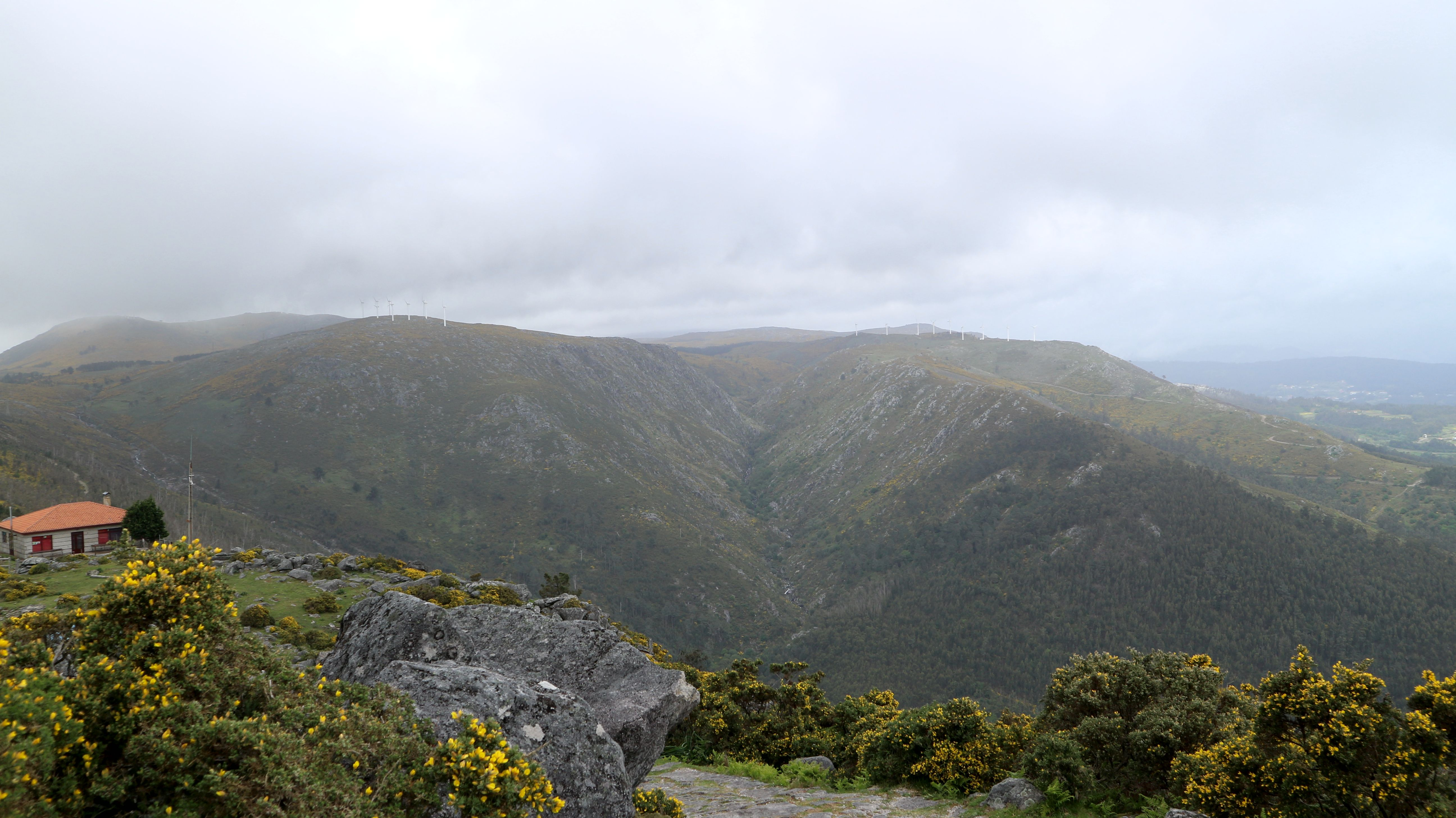 Vales dos ríos San Xoán, Barbanza e Pedras desde o monte da Curotiña, Ribeira.